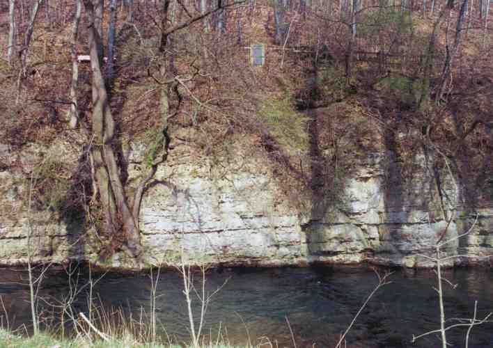 „Trompetersprung“ an der Nethe bei Rheder/Westfalen, Brakel, Kreis Höxter.